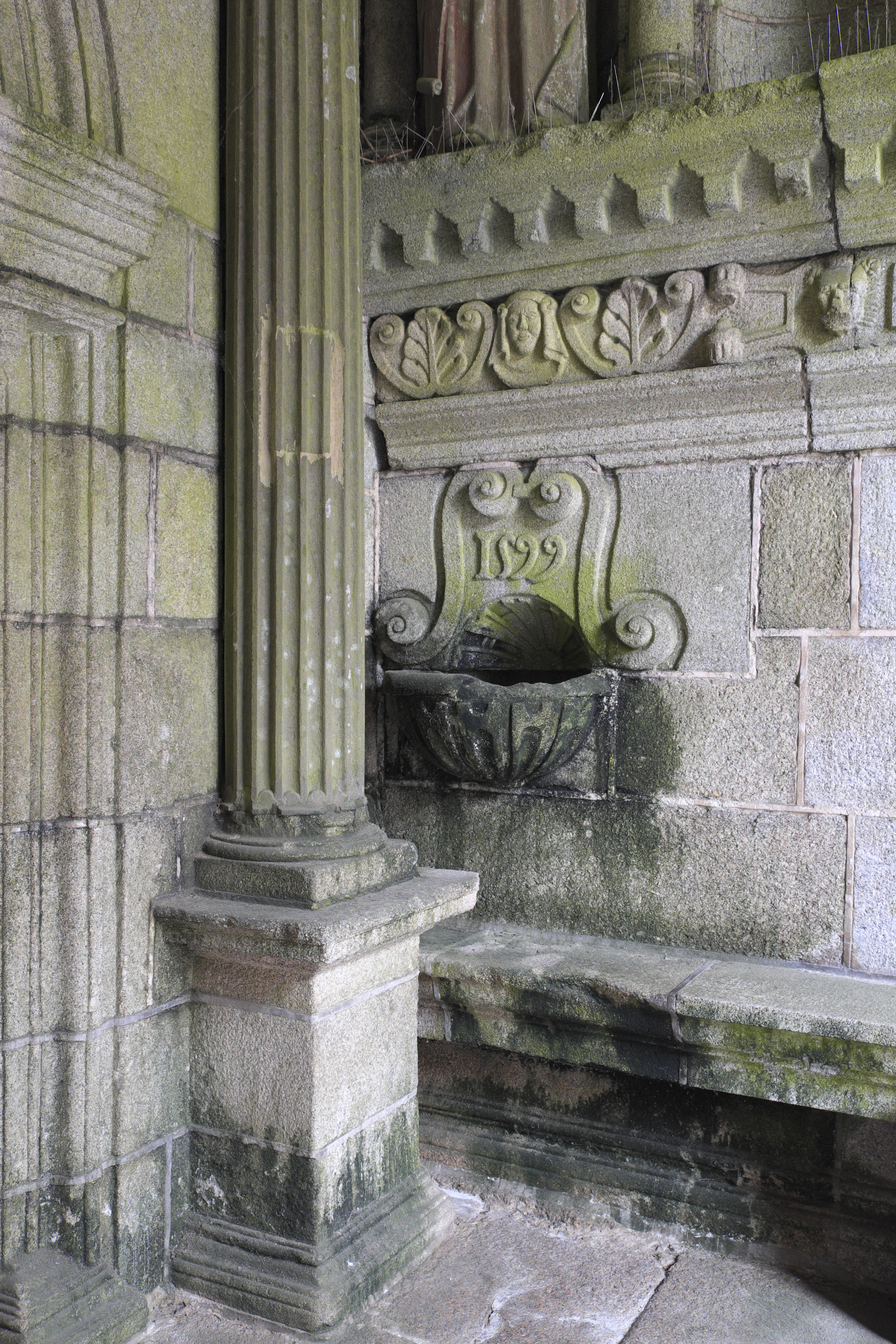 Katholische Pfarrkirche Notre-Dame in Saint-Thégonnec im Département Finistère (Region Bretagne/Frankreich), Weihwasserbecken in der Vorhalle